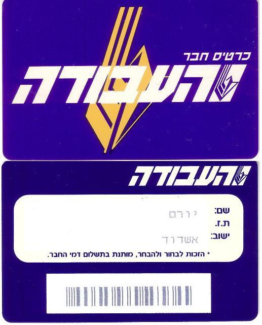 כרטיס חבר, מפלגת העבודה